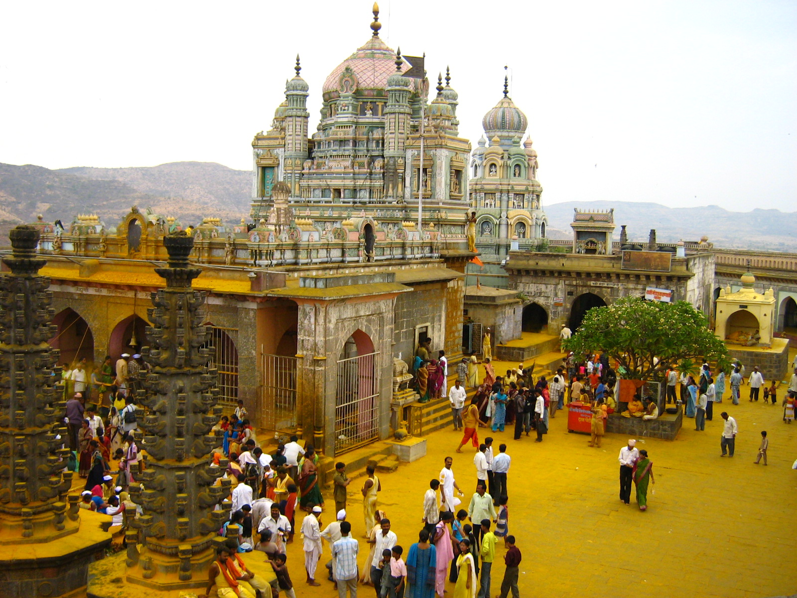 Jejuri Mandir..